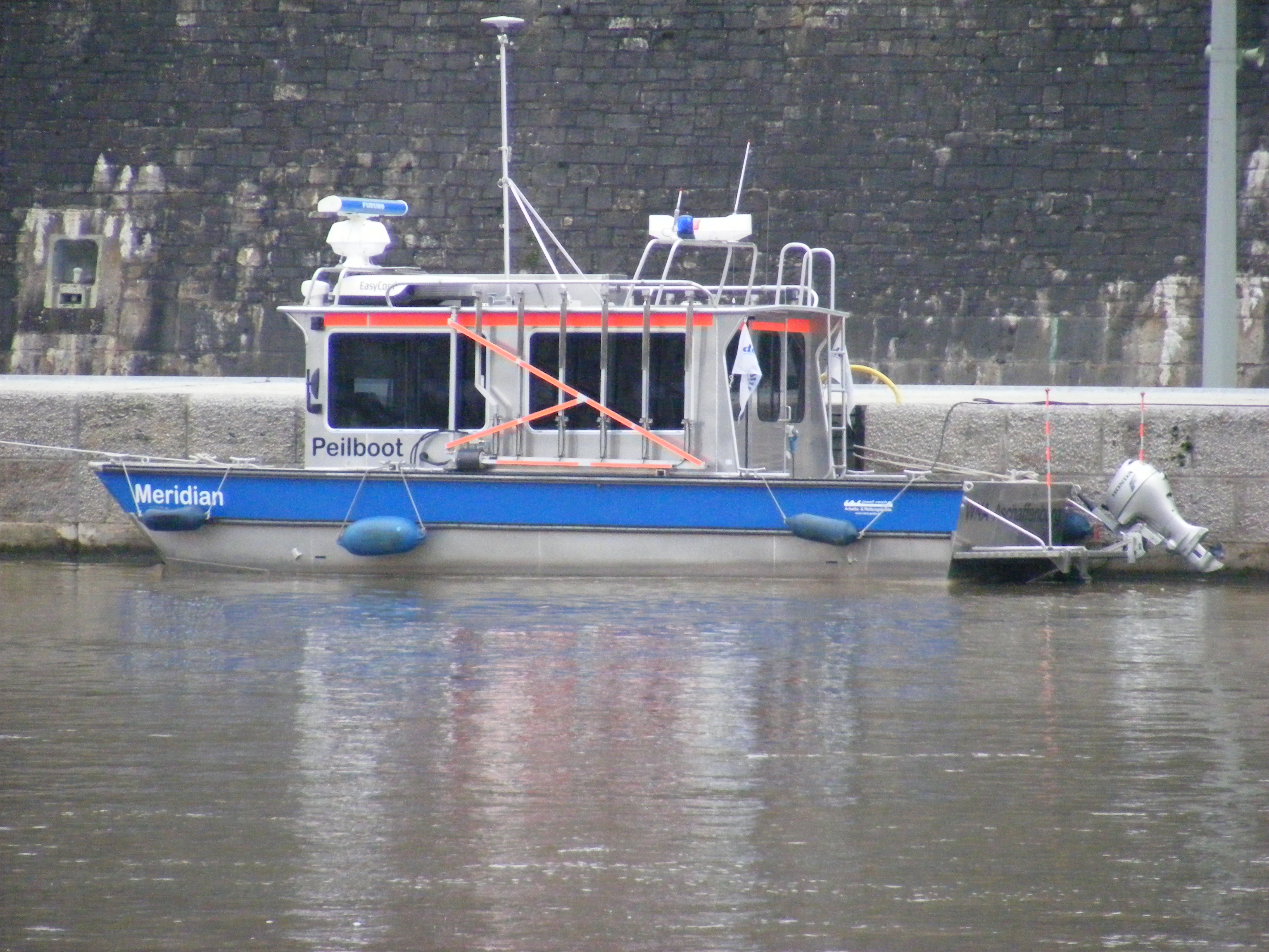 Peilboot Meridian des Wasserstraßen-Neubau-Amts Aschaffenburg auf dem Main, lag seinerzeit in Würzburg linksmainisch zwischen der Friedens- und der Löwenbrücke.